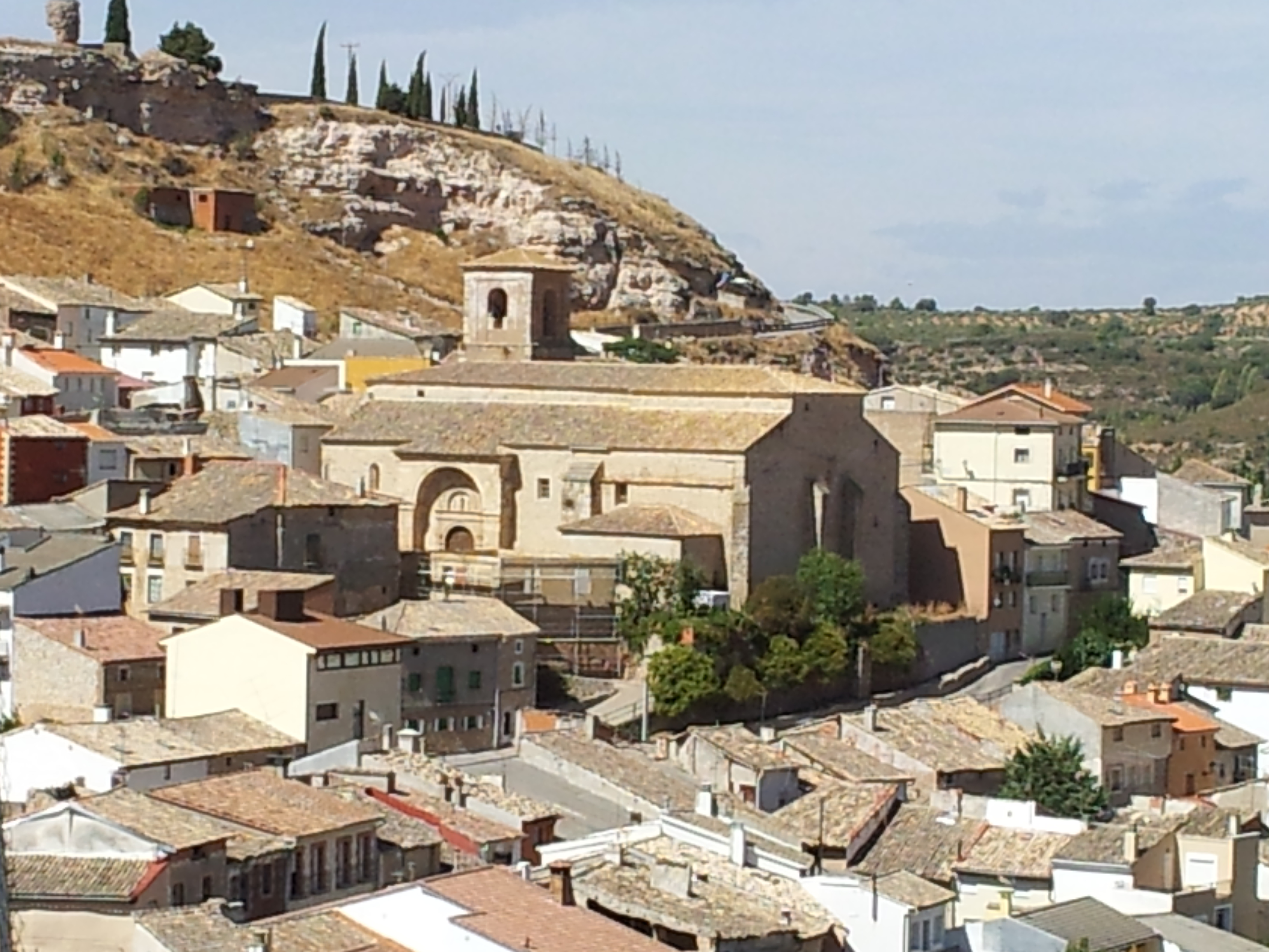 Iglesia Parroquial de Santa Eulalia de Mérida